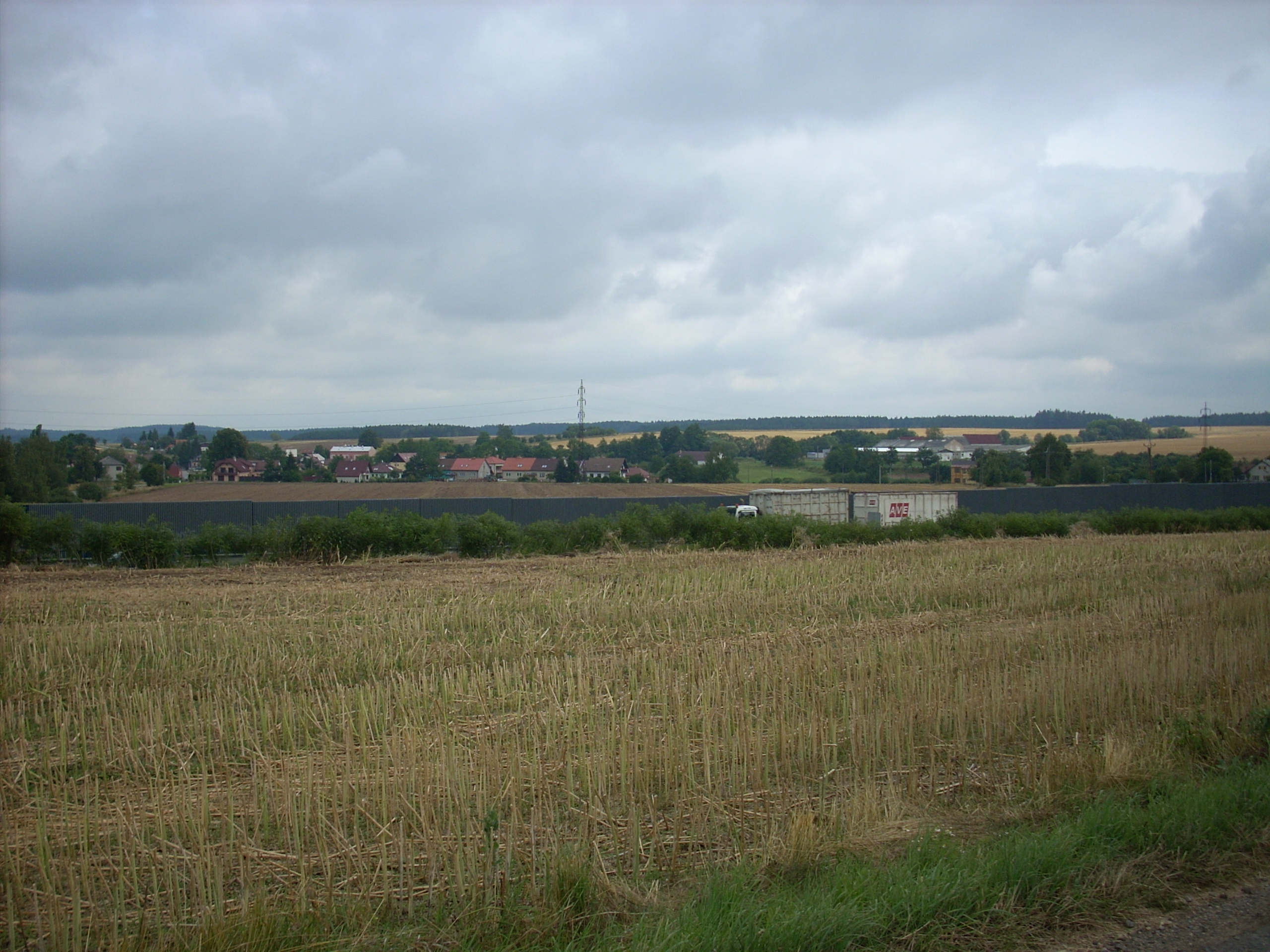 Měšín a D1 od Jihlavy